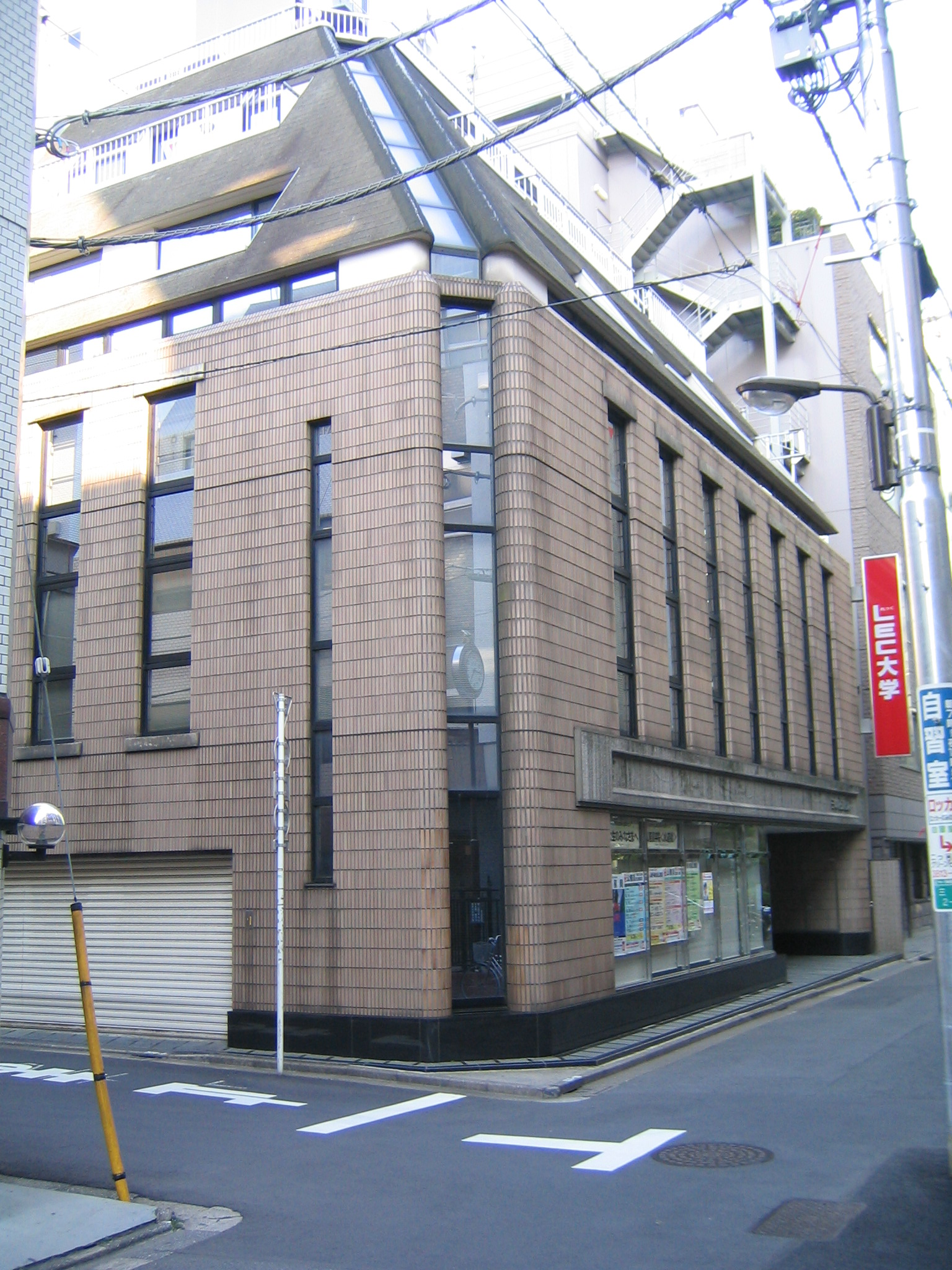 LEC東京リーガルマインド大学千代田キャンパス